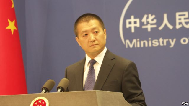 中国外交部新闻司司长兼发言人陆慷在外交部例行记者会上